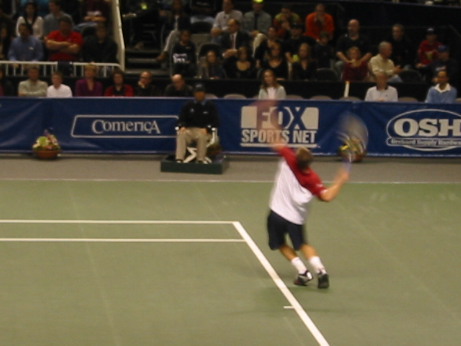 Andy Roddick: Siebel Open 2004